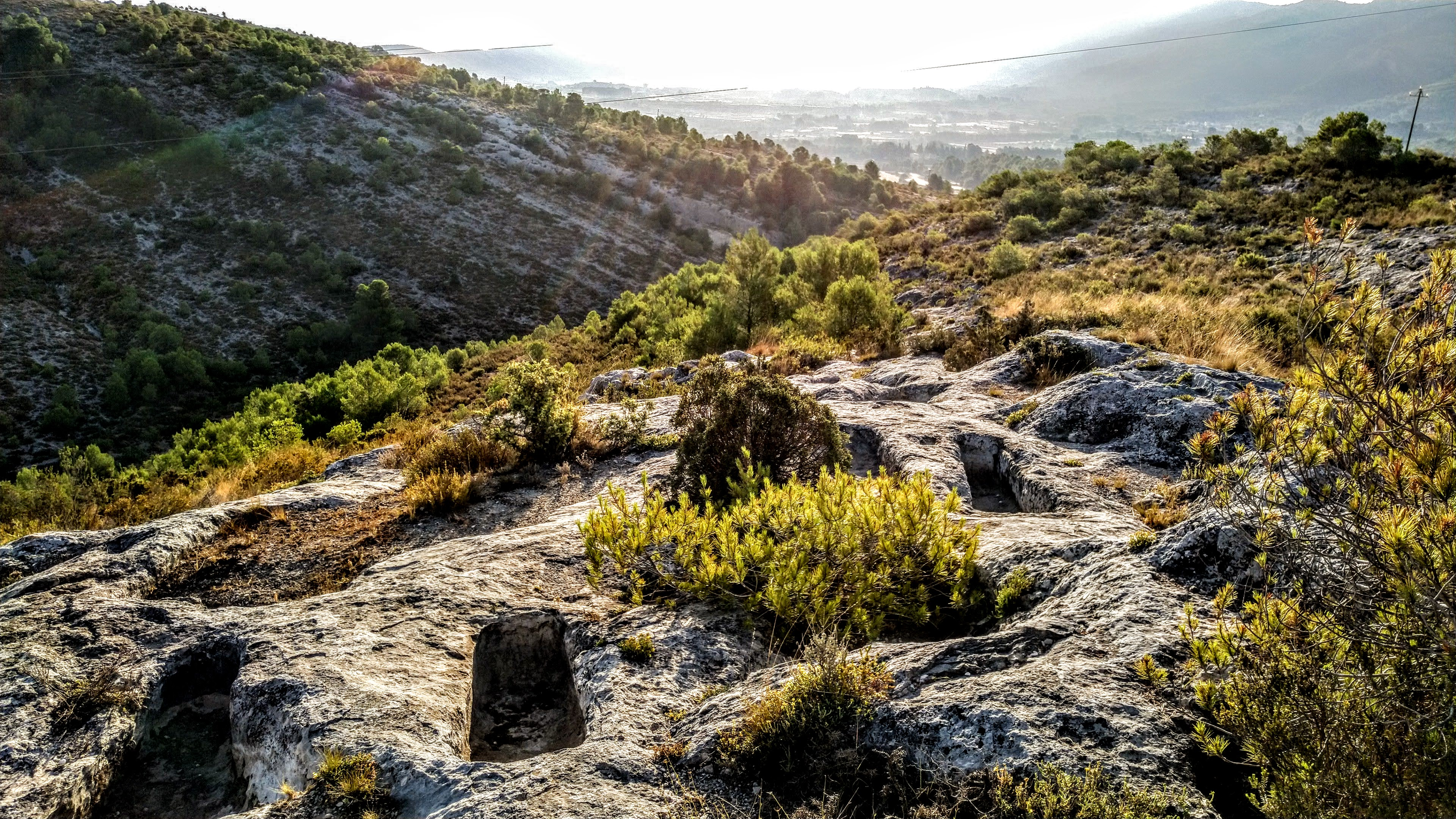 Necròpolis del Mas del Pou, a Alfafara